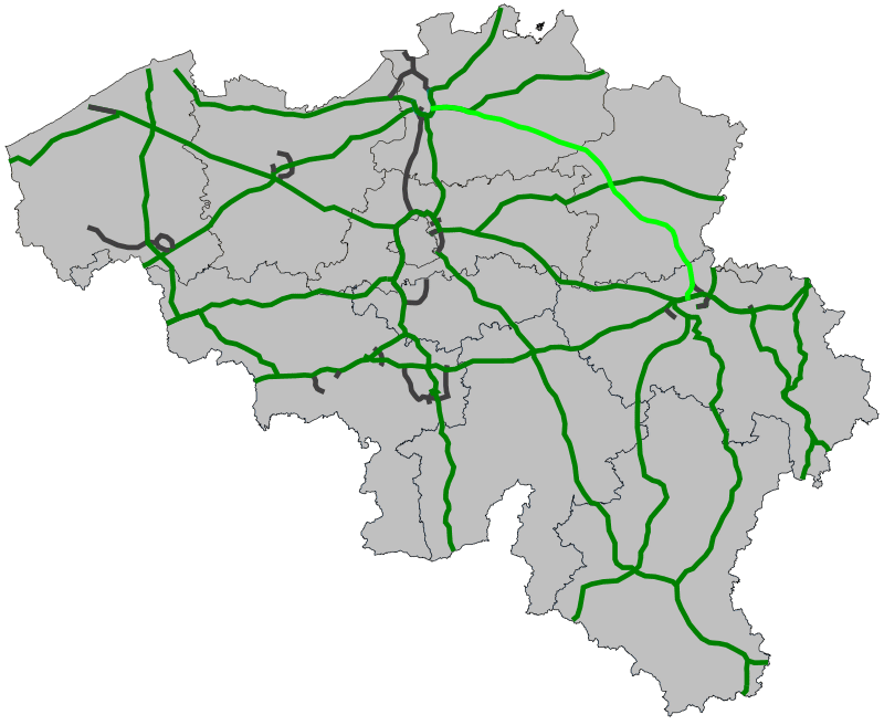 Traject Europese weg 313 door België